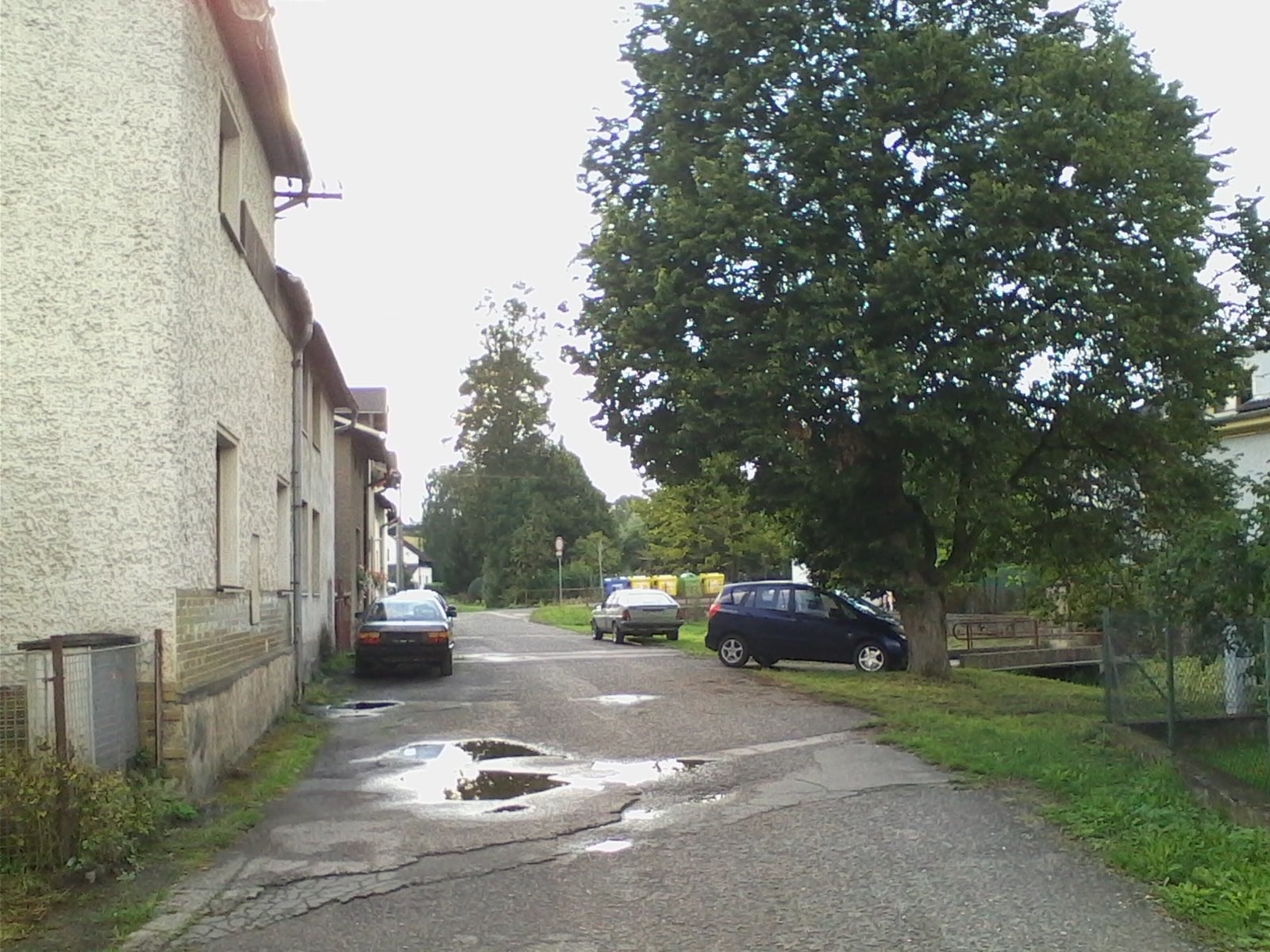 Dřívější Zbečnické náměstí.